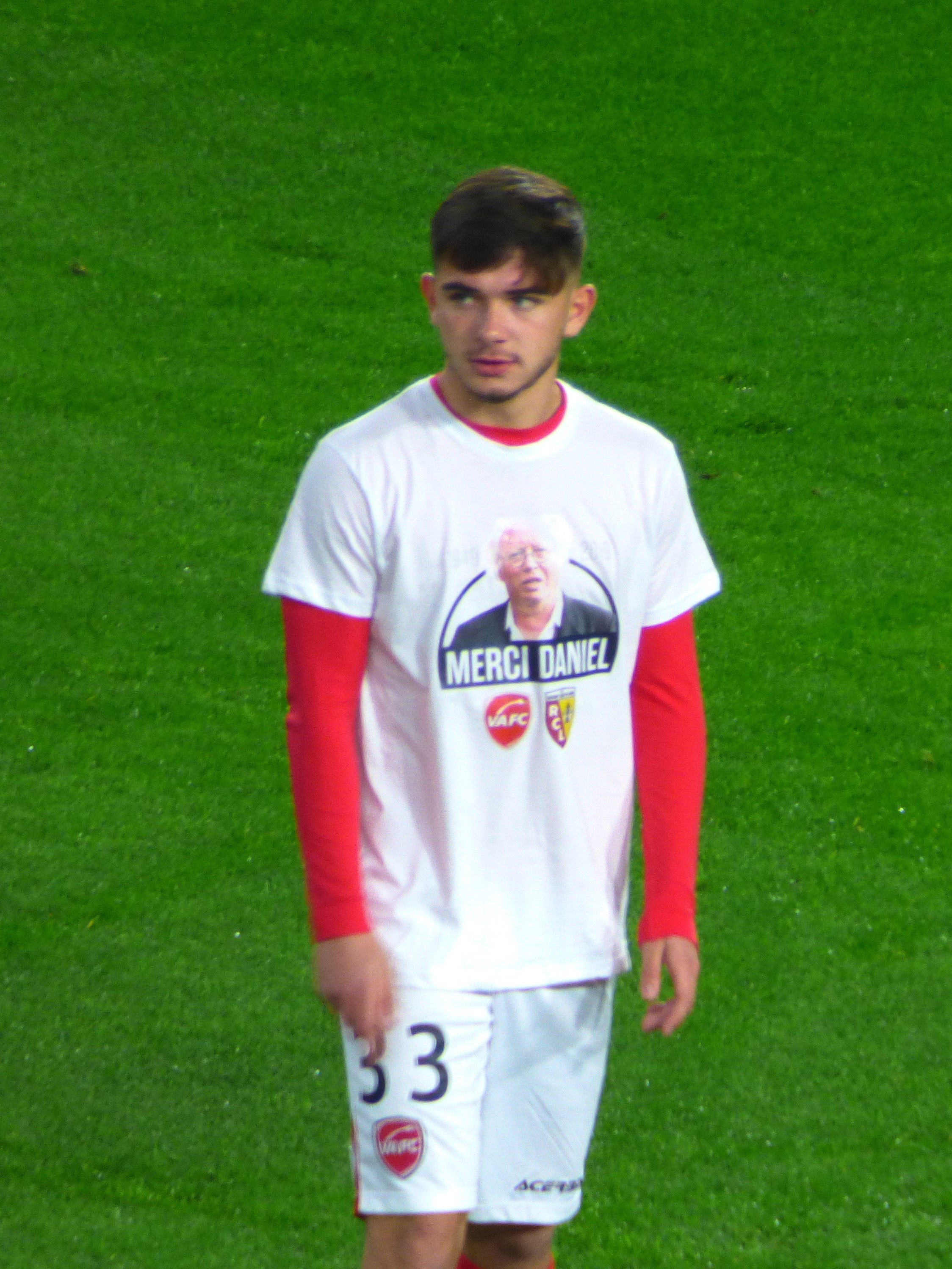 Noah Diliberto avant le match Valenciennes FC / RC Lens, comptant pour la seizième journée du championnat de France de football de Ligue 2 2019-2020, le 29 novembre 2019.